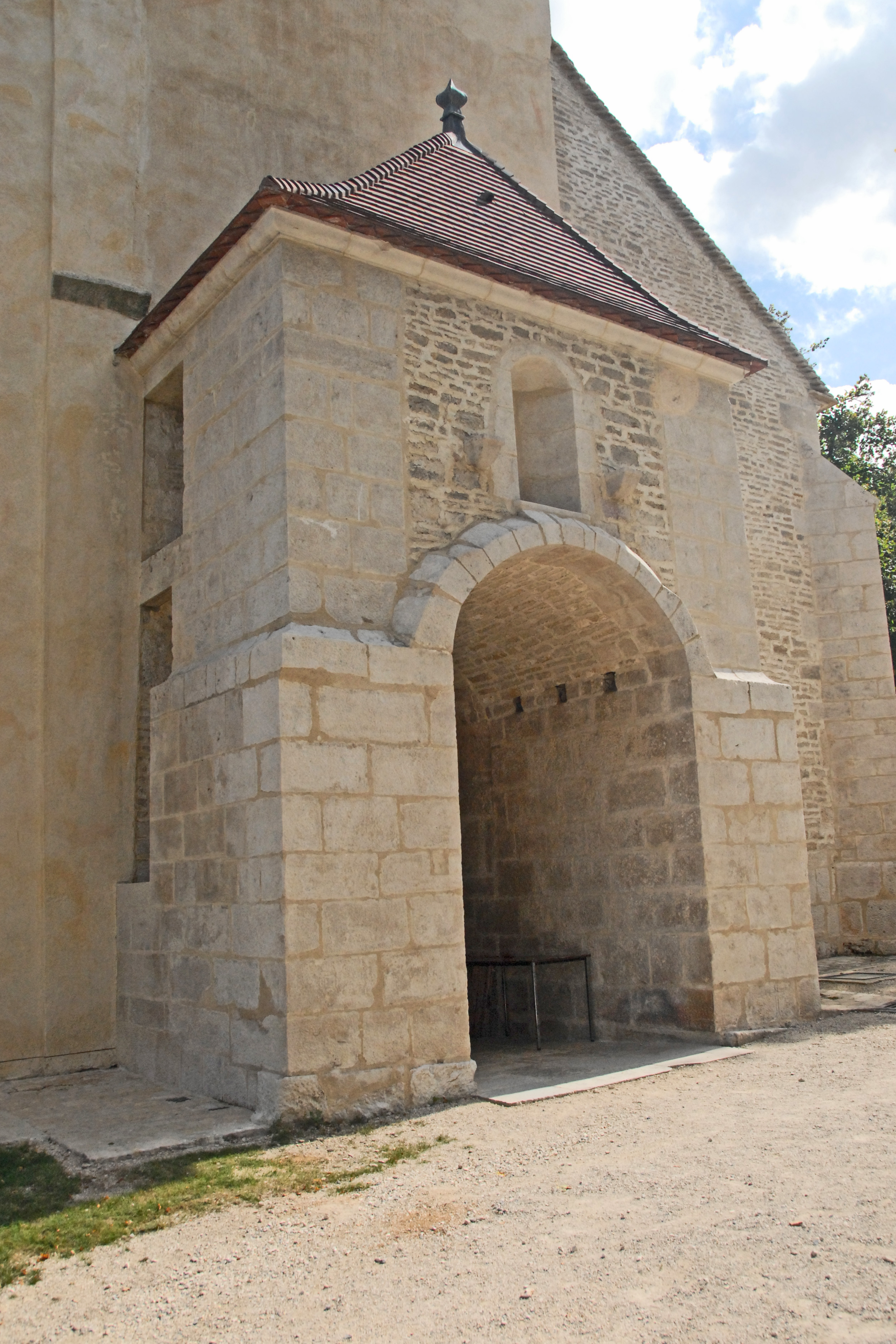 St-Vorles de Châtillon-sur-Seine, Vorhalle